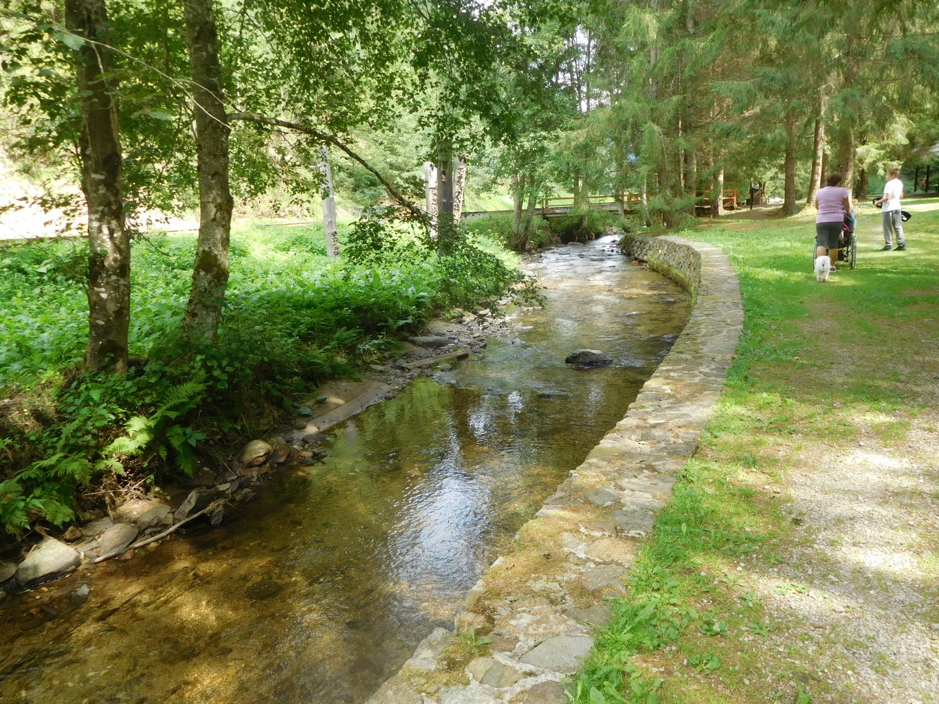 Vydrovo v skanzene